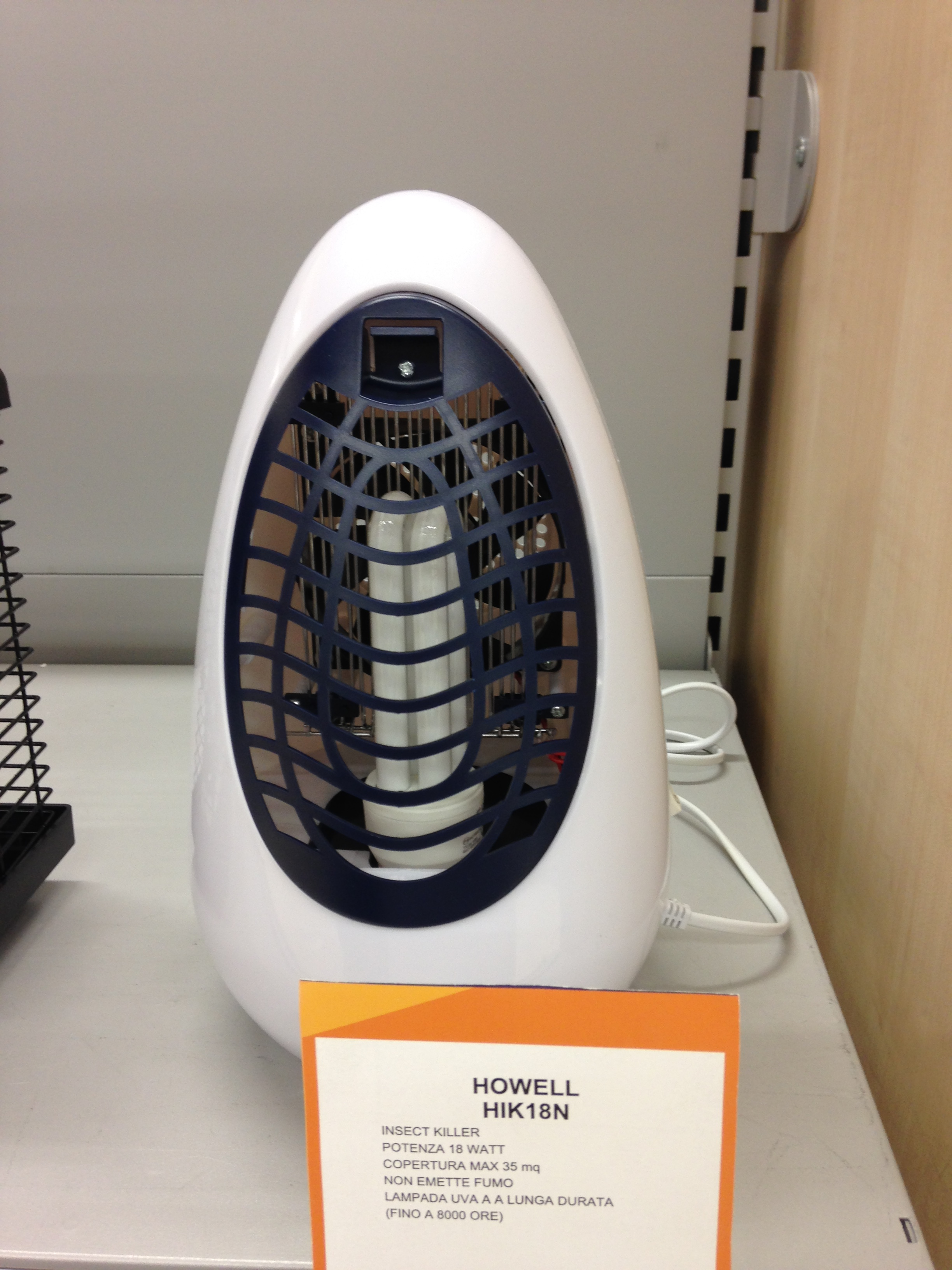 Zanzariera elettrica Howell Hik18N con lampada UVA, griglia metallica elettrica e ventola con effetto aspirante